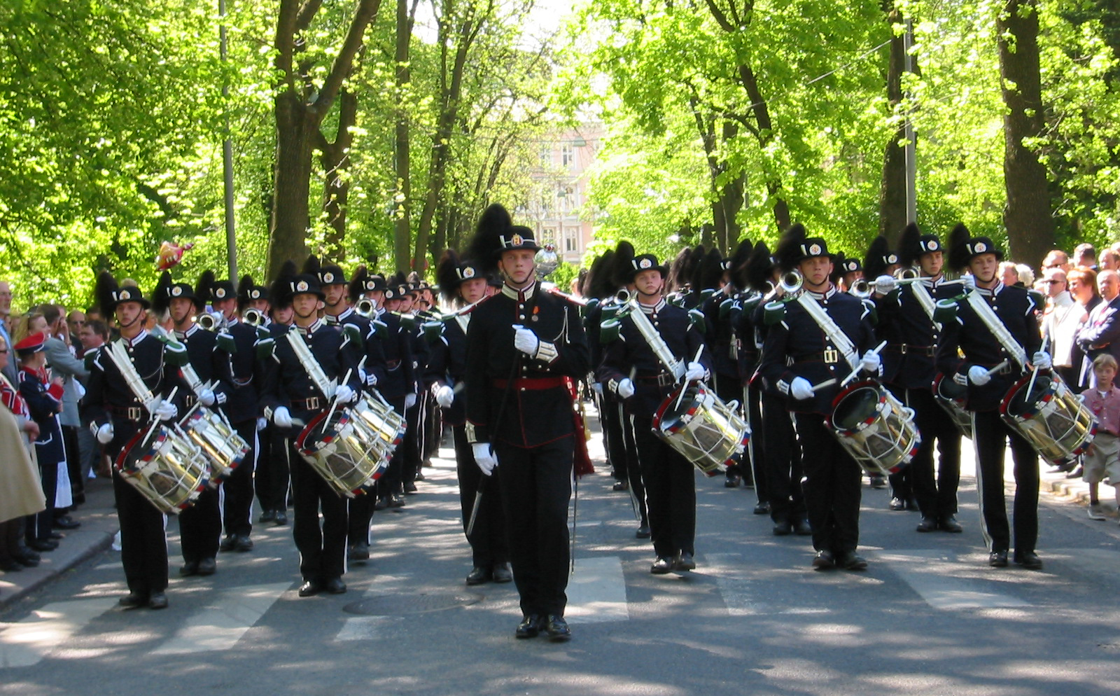 HMKG 17. mai 2002 bak slottet